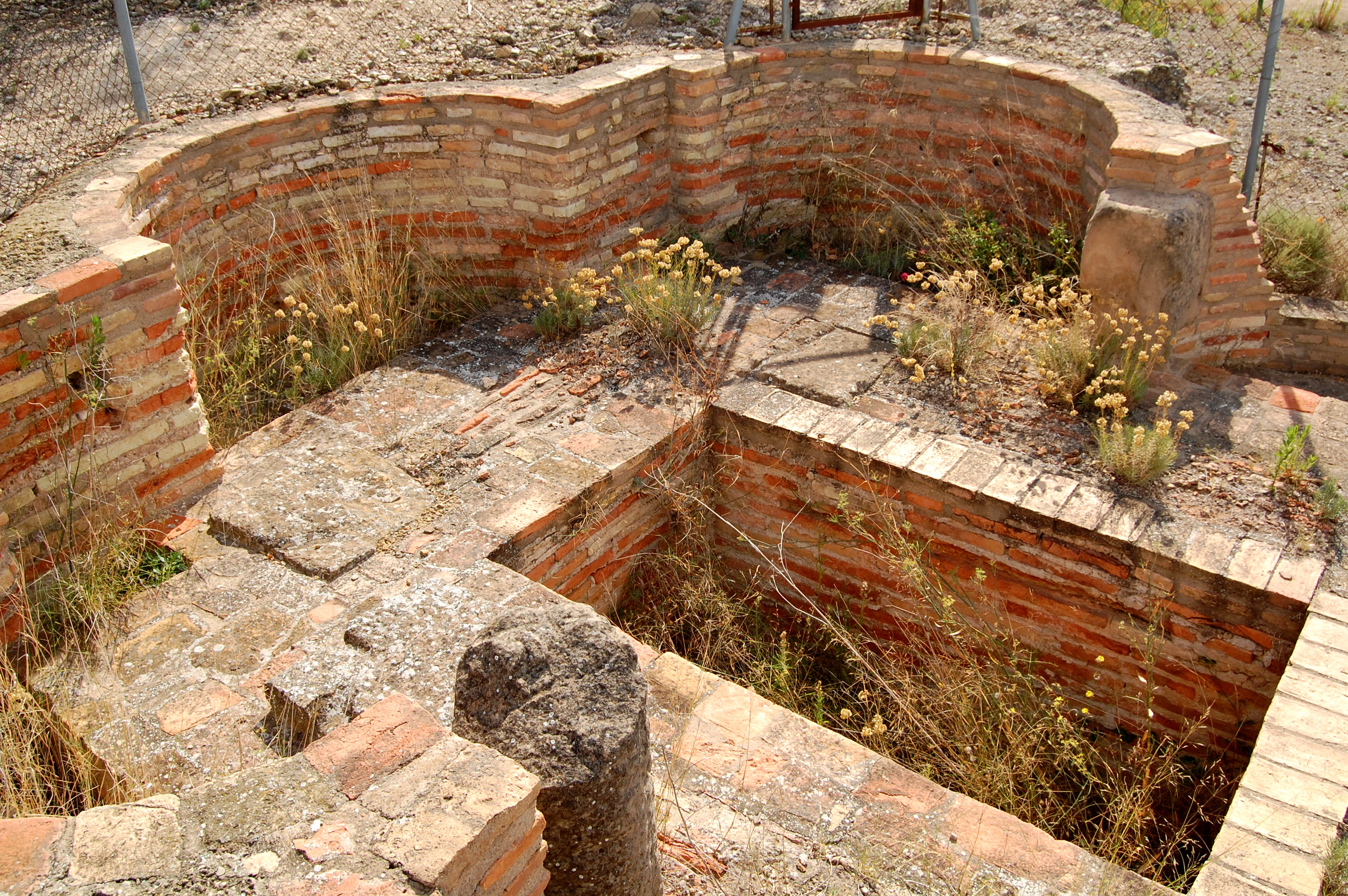 Mausoleo romano en Corella (Navarra) R.I.) - 55 - 0000555 - 00000 .